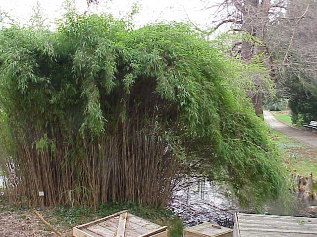 Species: Pseudosasa japonica Family: Poaceae Image No. 3